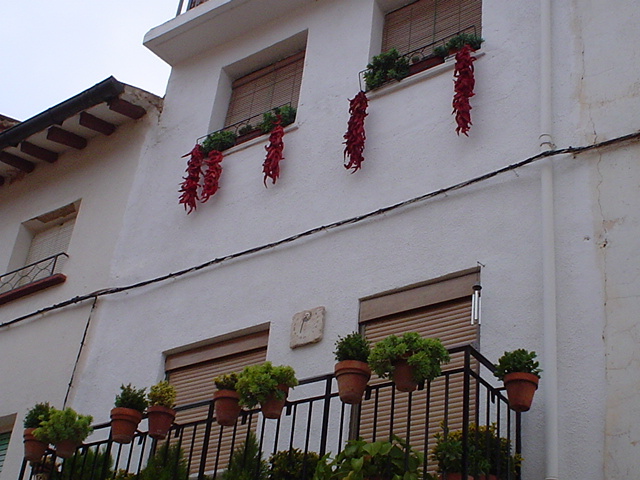 Casa de la localidad de Ventosa (La Rioja). España. Puede apreciarse el tradicional secado de pimientos para su conservación para su consumo en los próximos meses.